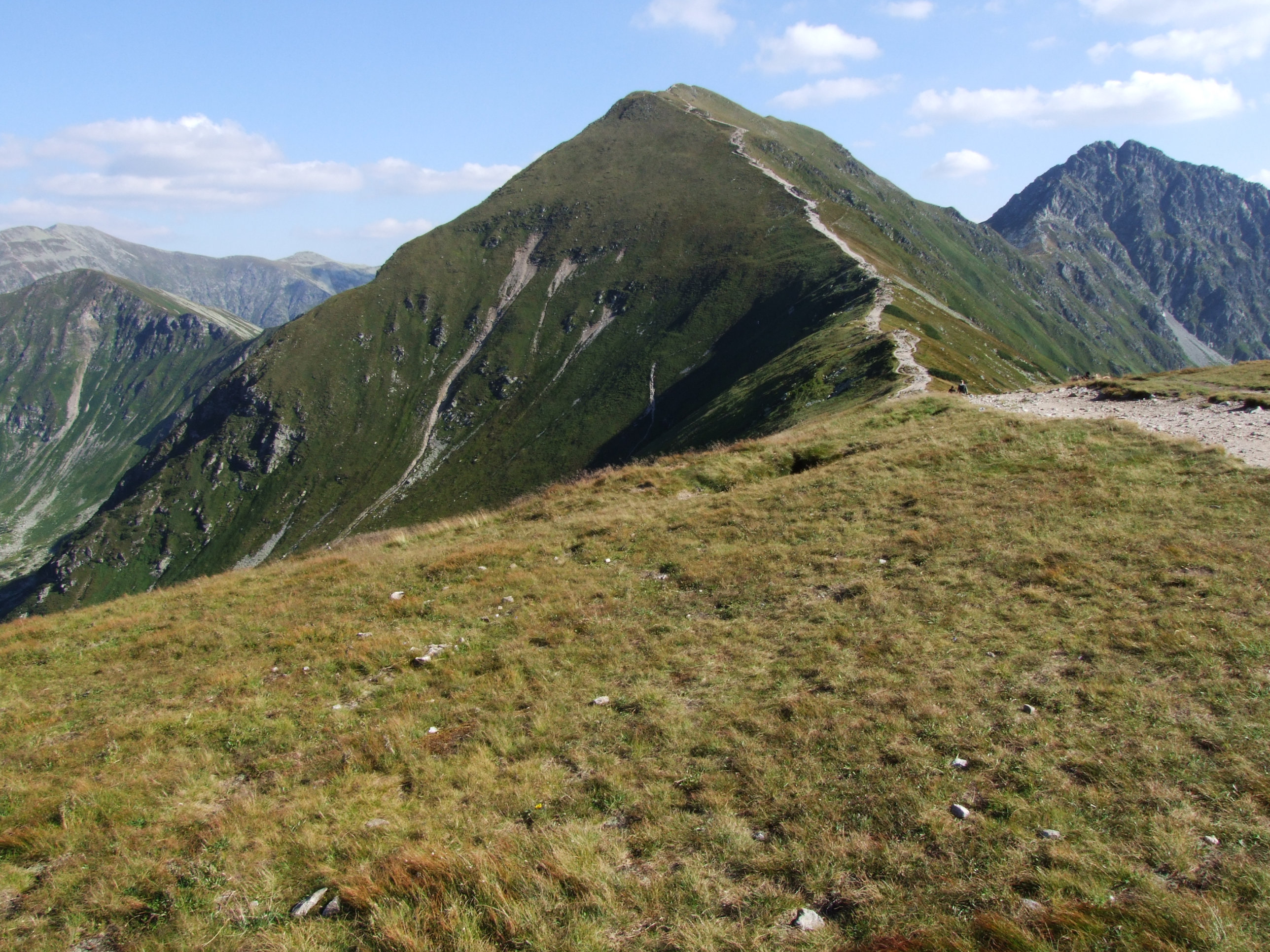 Wołowiec (Tatry Zachodnie)